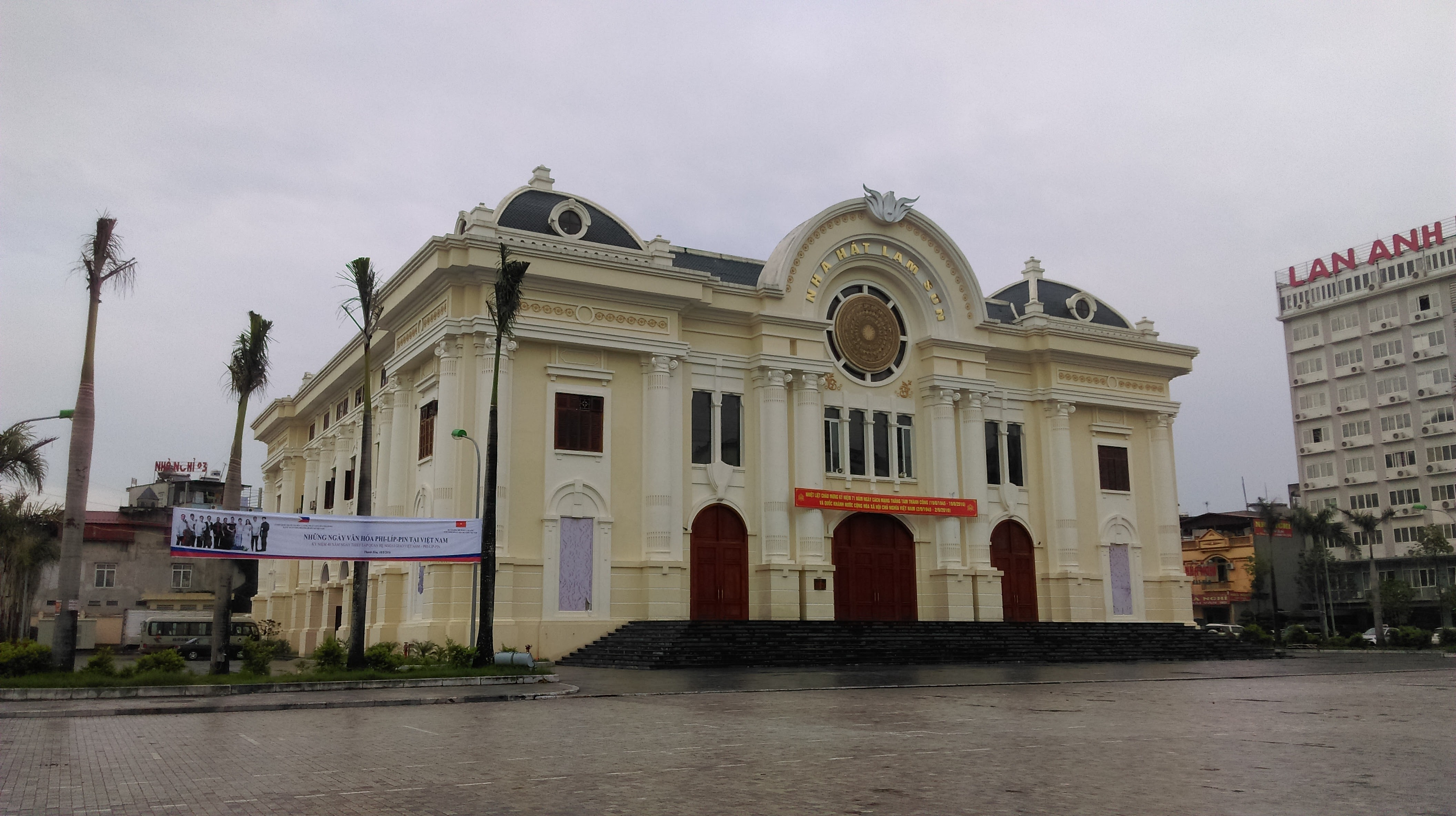 Nhà hát Lam Sơn, Thanh Hóa